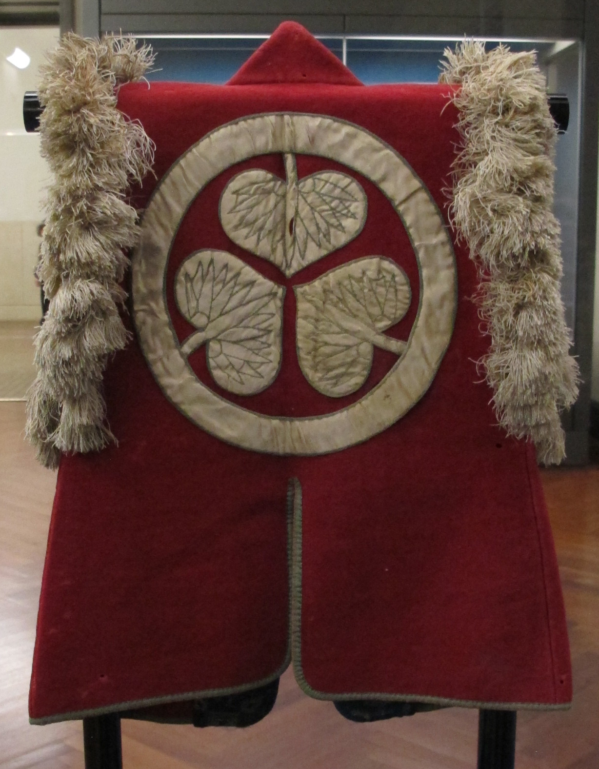 Periodo edo, jinbaon, XVIII sec